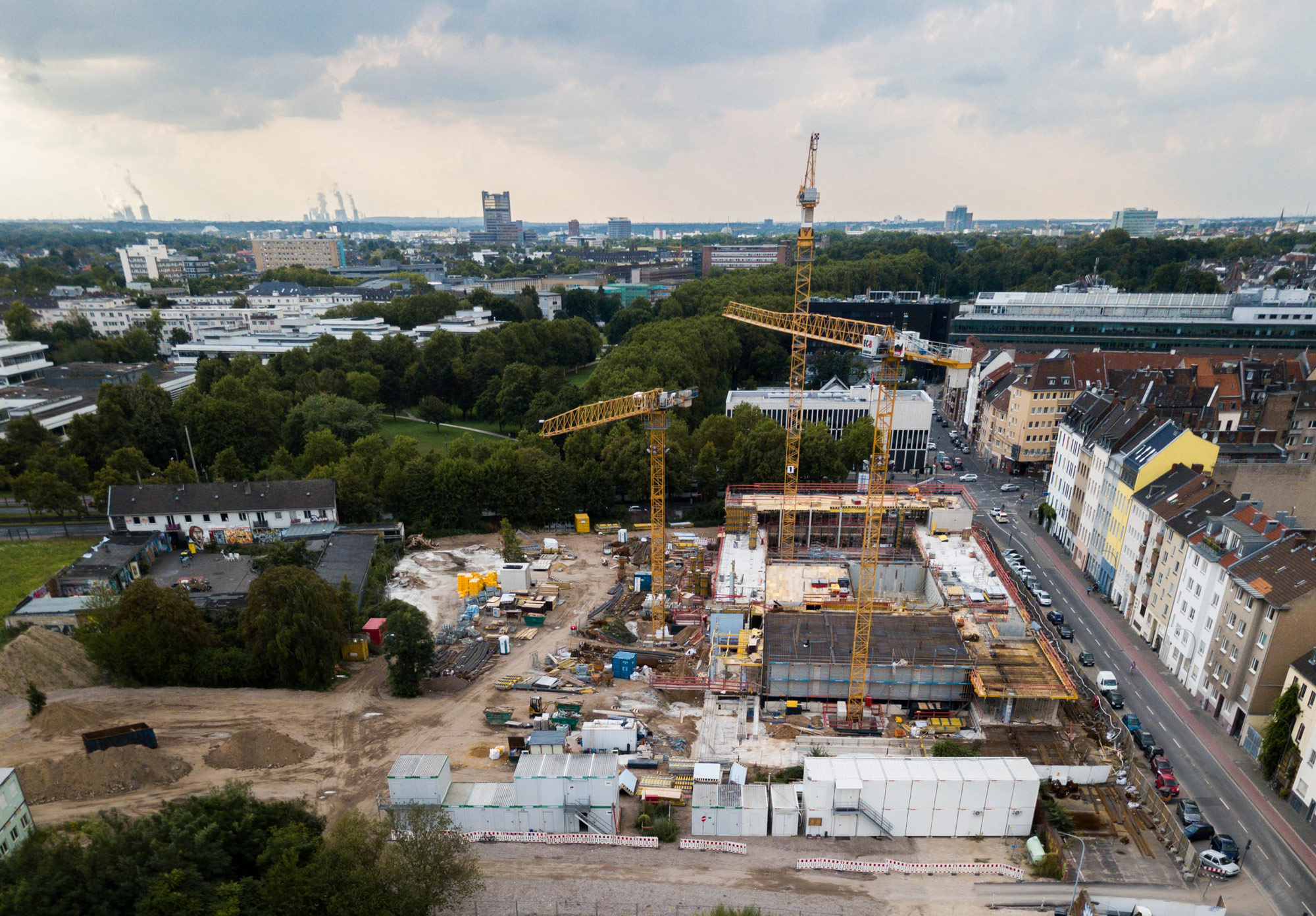 Nach dem Einsturz des "Stadtarchivs" von Köln 2009 wurde 2017 mit einem Neubau an anderer Stelle begonnen, nämlich an der Luxemburgerstraße in Köln.